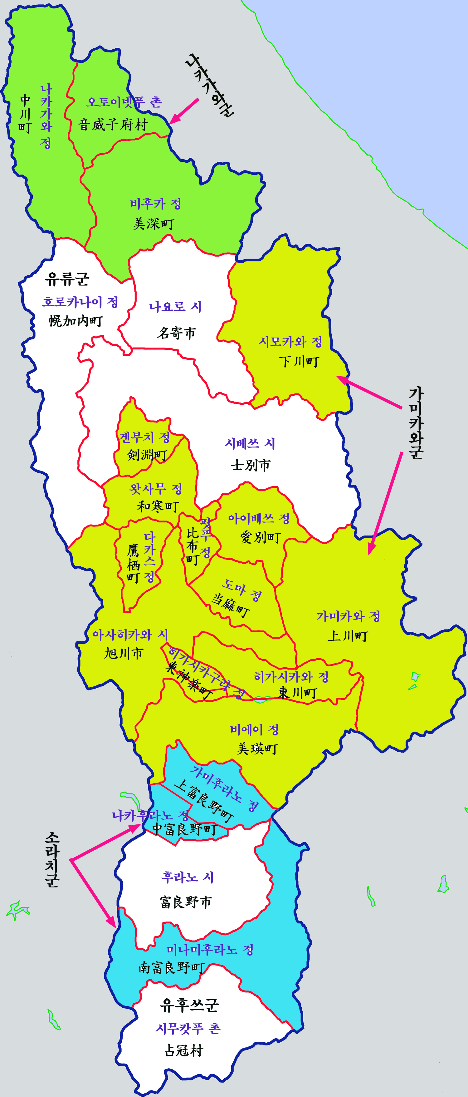 가미카와종합진흥국 행정구역